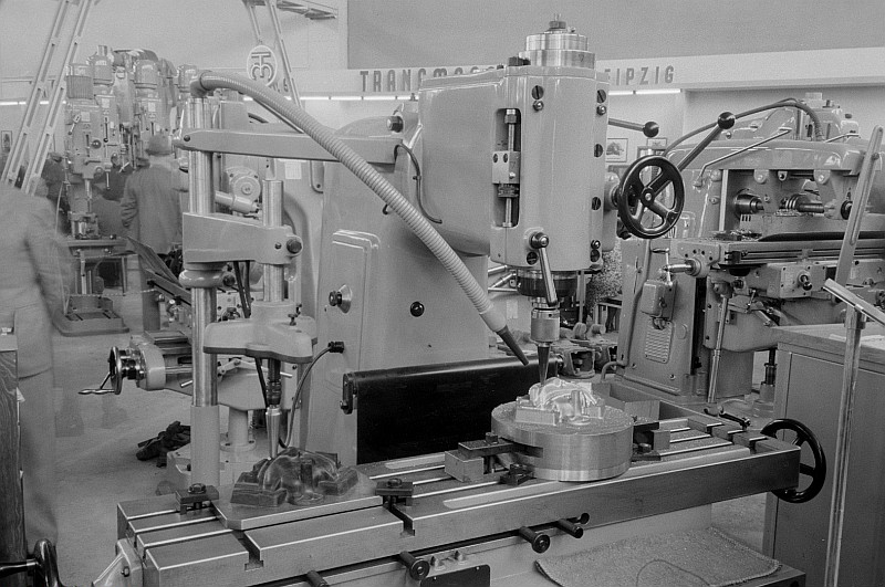 Original image description from the Deutsche Fotothek Werkzeugmaschine der VVB Werkzeugmaschinen und Werkzeuge Chemnitz (WMW), Technische Messe 1953